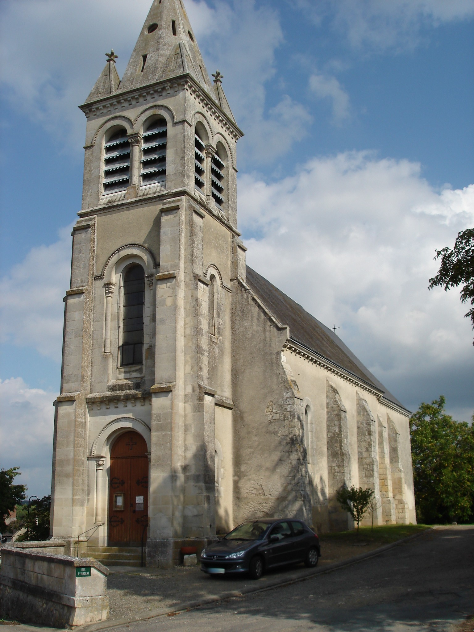 Néons-sur-Creuse (36) : L'église Saint-Vincent.